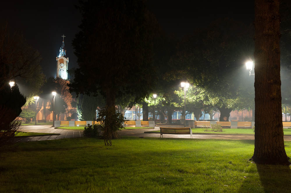 Plaza de la Concordia